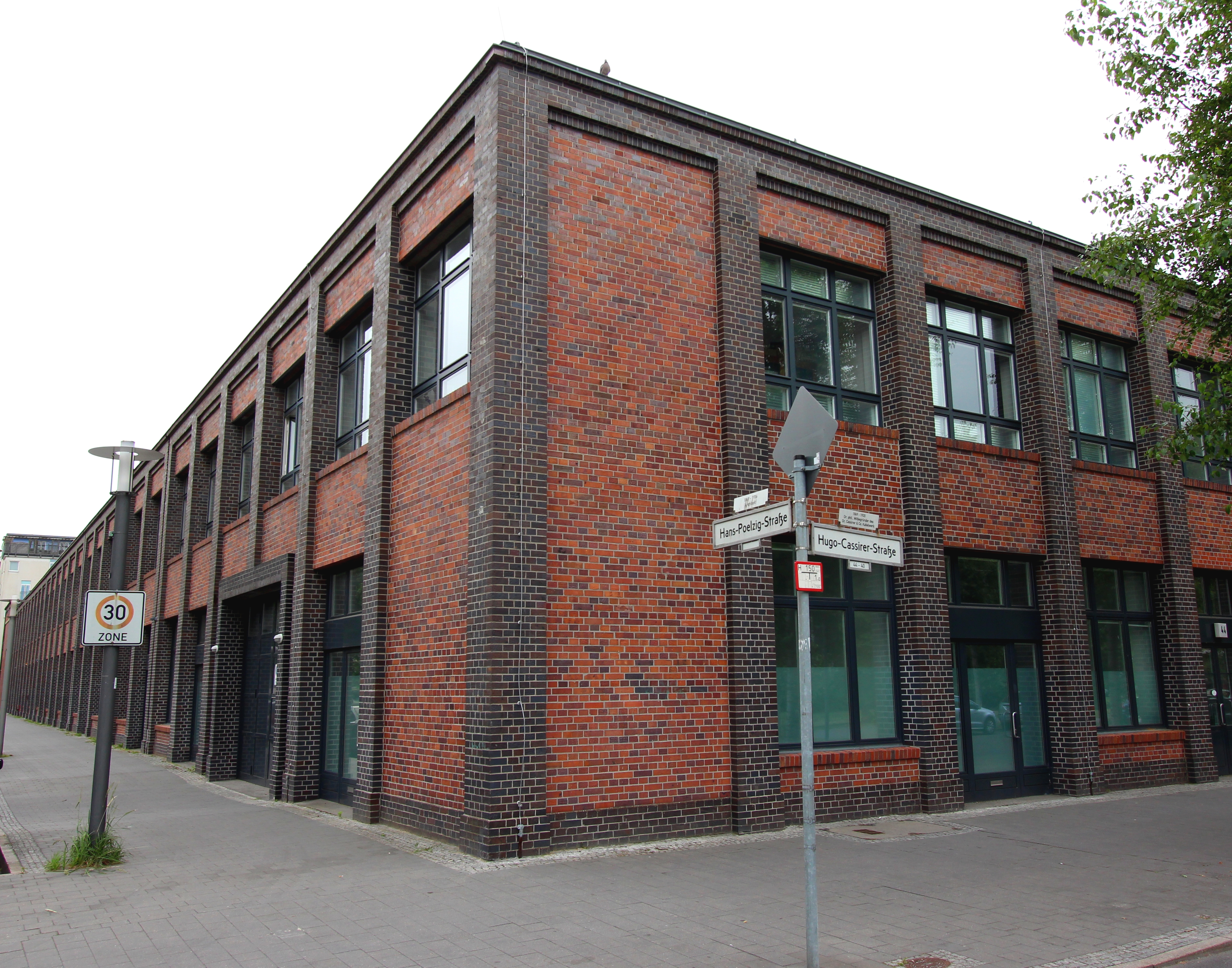 Die Poelzig-Halle im Jahre 2012